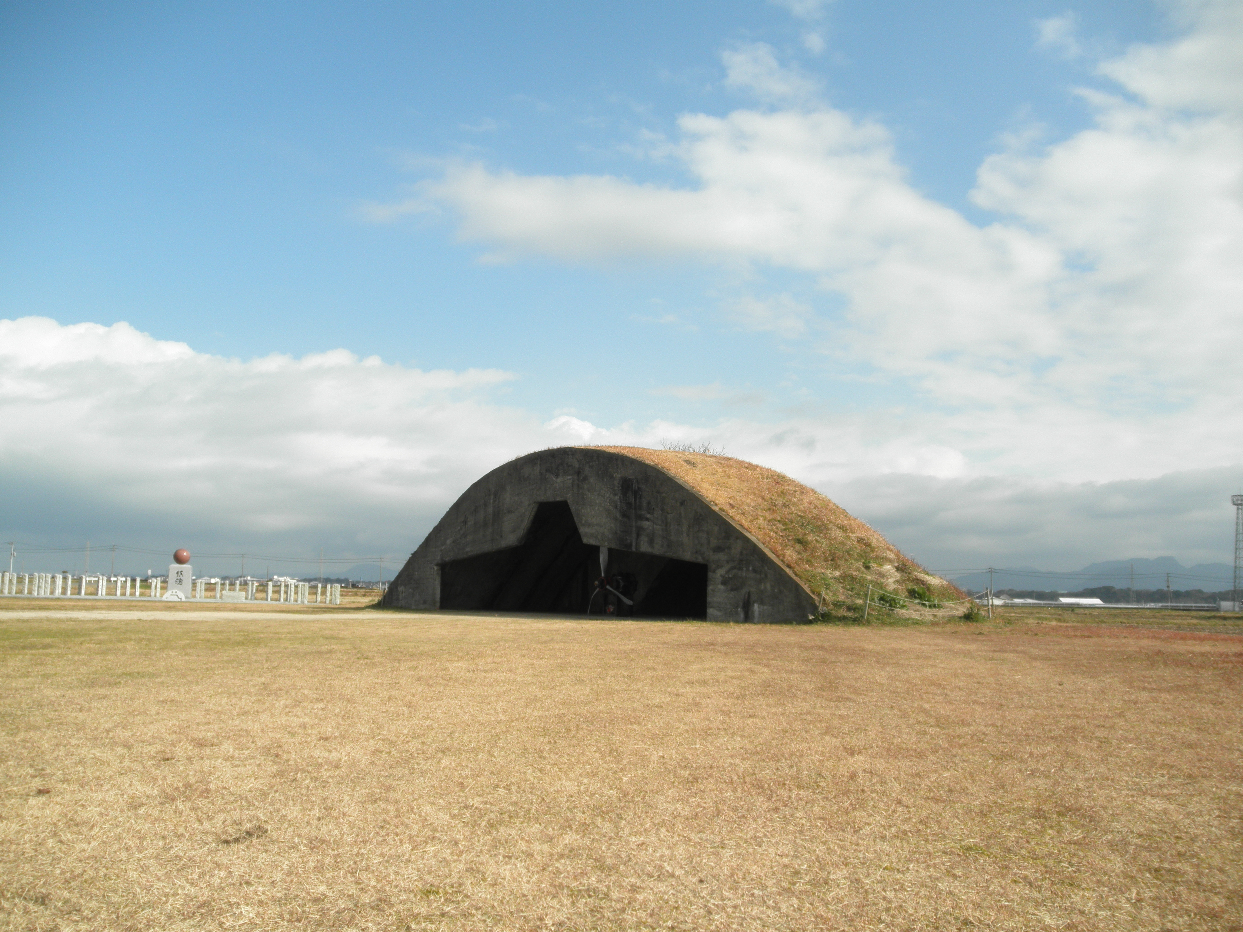 城井1号掩体壕、正面ちょっと引き気味から撮影しました。